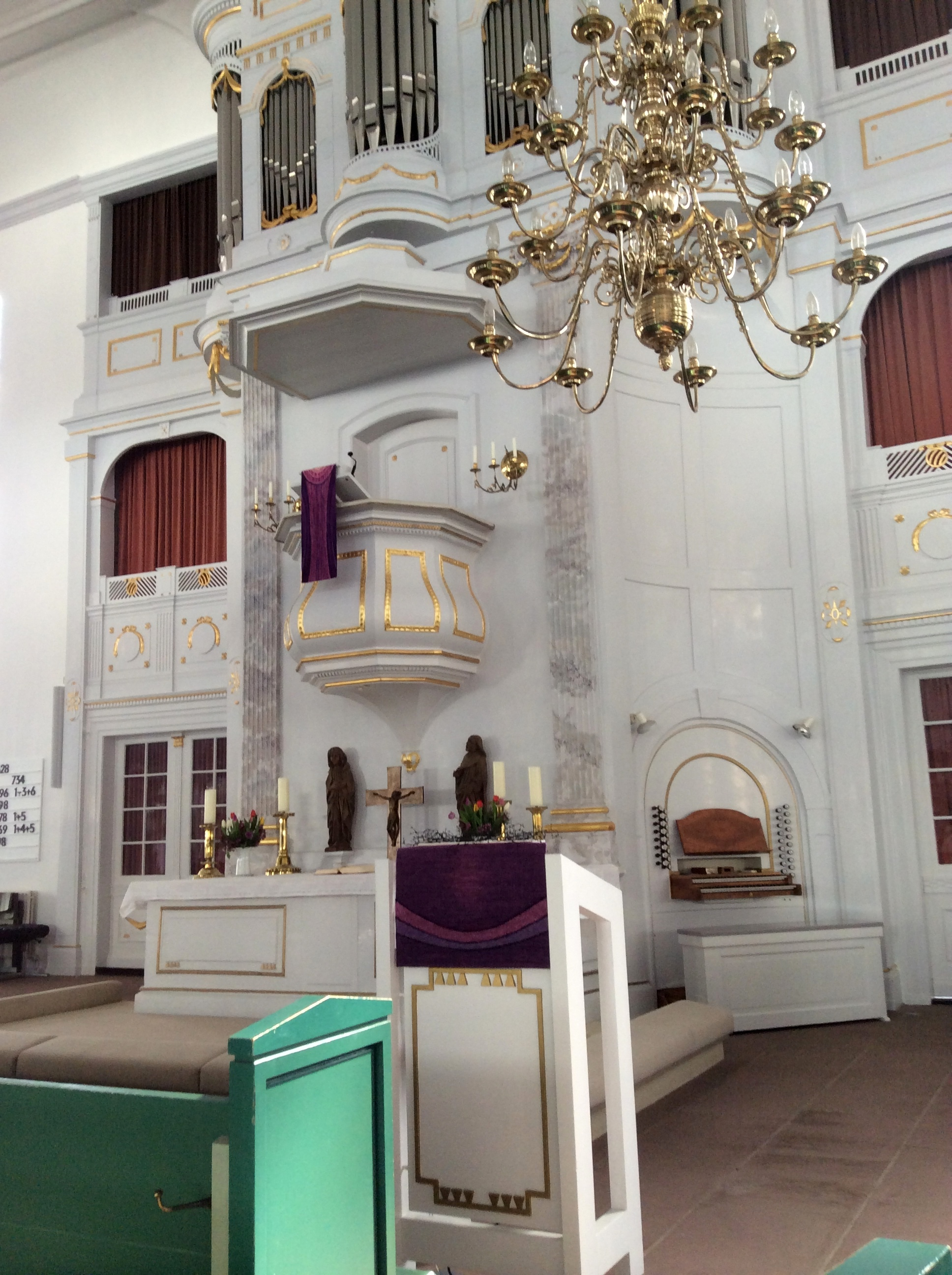 Der Innenraum der Kirche verdeutlicht die Bedeutung des Wortes für die Protestanten